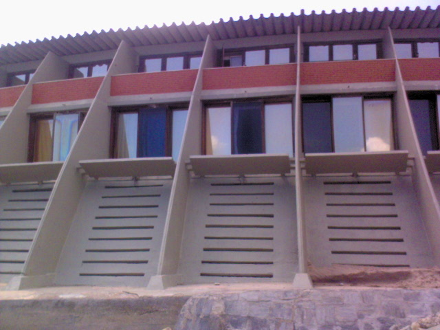 Vista externa do Hotel Tropical Tambaú